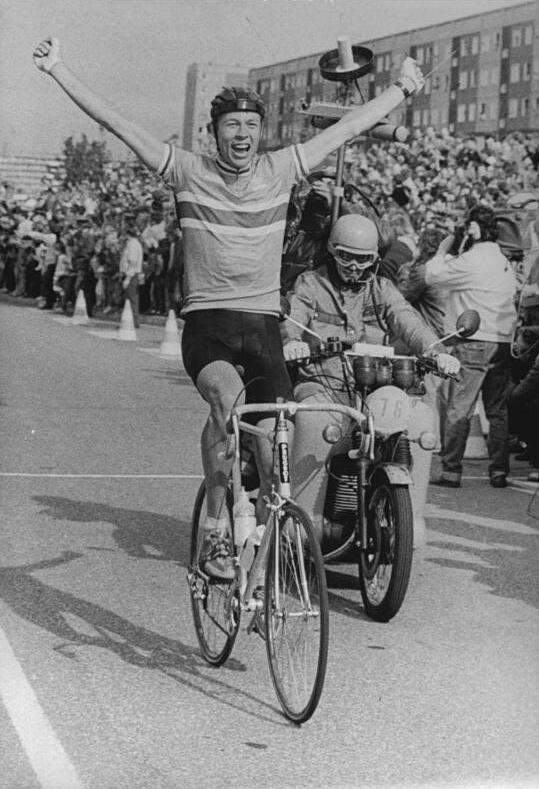 ADN-ZB Kasper 11.5.87 ma-Gera: 40. Internationale Friedensfahrt-3. Etappe von Magdeburg nach Gera über 186 km. Jubelnd fährt der Norweger Morten Sæther über die Ziellinie. Der 27jährige Friedensfahrt-Neuling konnte nicht sich nach 9 Kilometern vor dem Ziel aus der 15köpfigen Spitzengruppe lösen und erkämpfte mit großem Einsatz den Etappensieg.